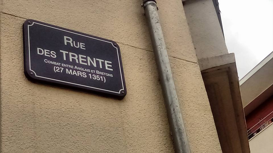 plaque de la rue des trente, Rennes